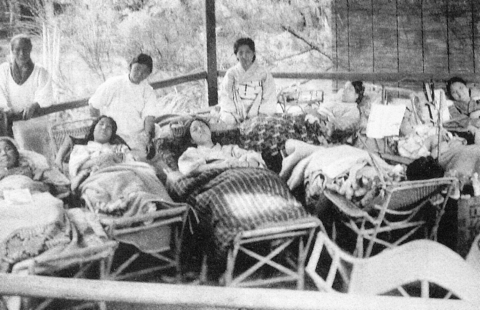 南湖院の横臥堂で外気に当たる女性患者。